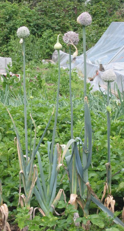 zelfgemaakte foto van bloeiende winterprei ras Farinto; eind juni